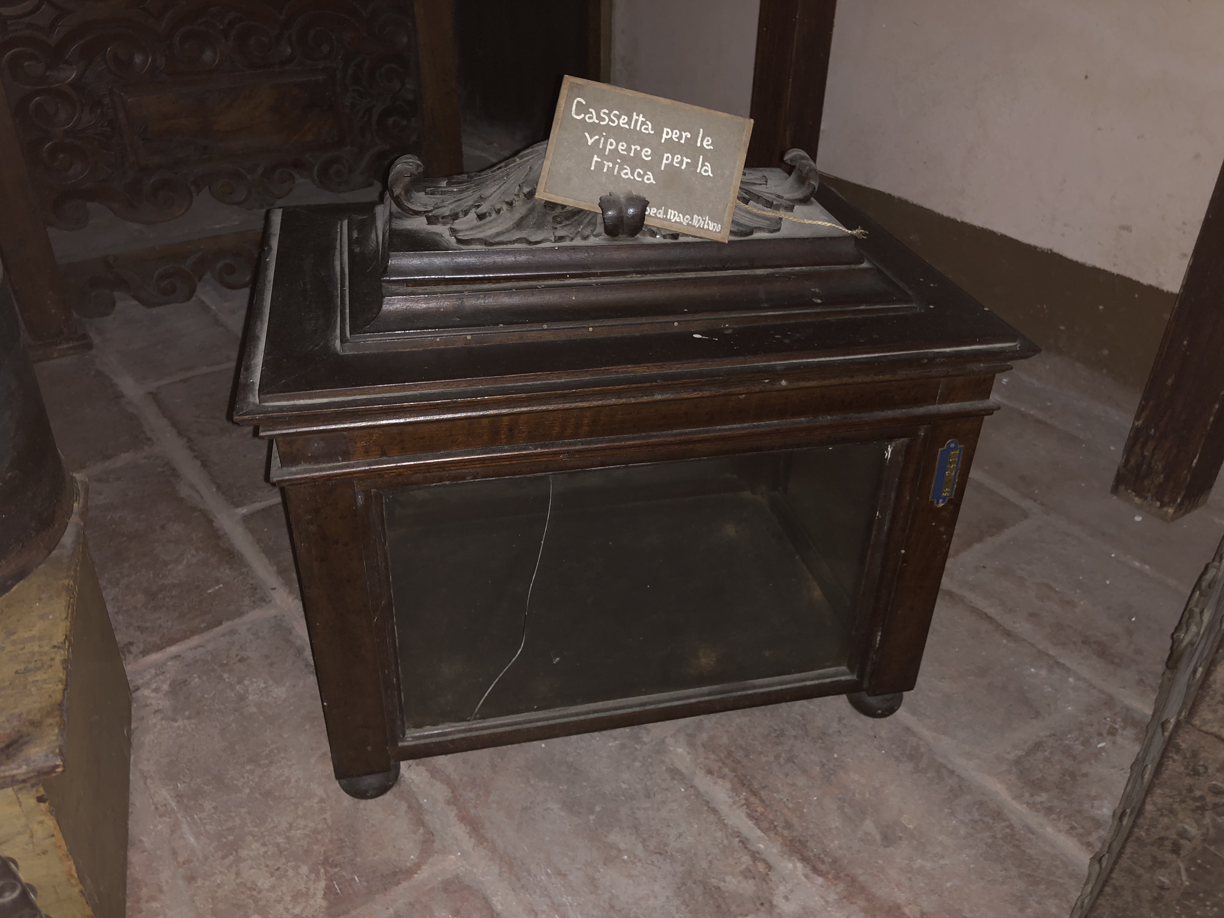 Foto di un contenitore per le vipere per la teriaca